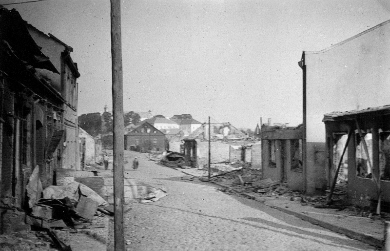 das zerstörte Tauroggen 1941